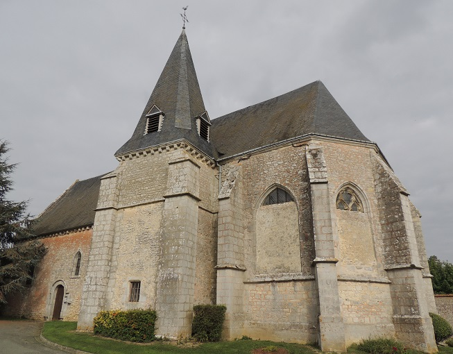 Église Saint-Jean avec son chevet à 3 pans séparés de renforts, le massif clocher large mais pas très haut et à gauche le mur sud de la vieille nef derrière un arbre à l’extrême gauche.